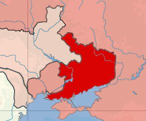 Карта расположения Донецко-Криворожской республики